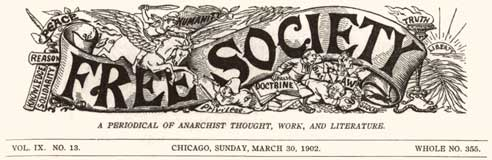 Free Society - journal anarchiste américain.